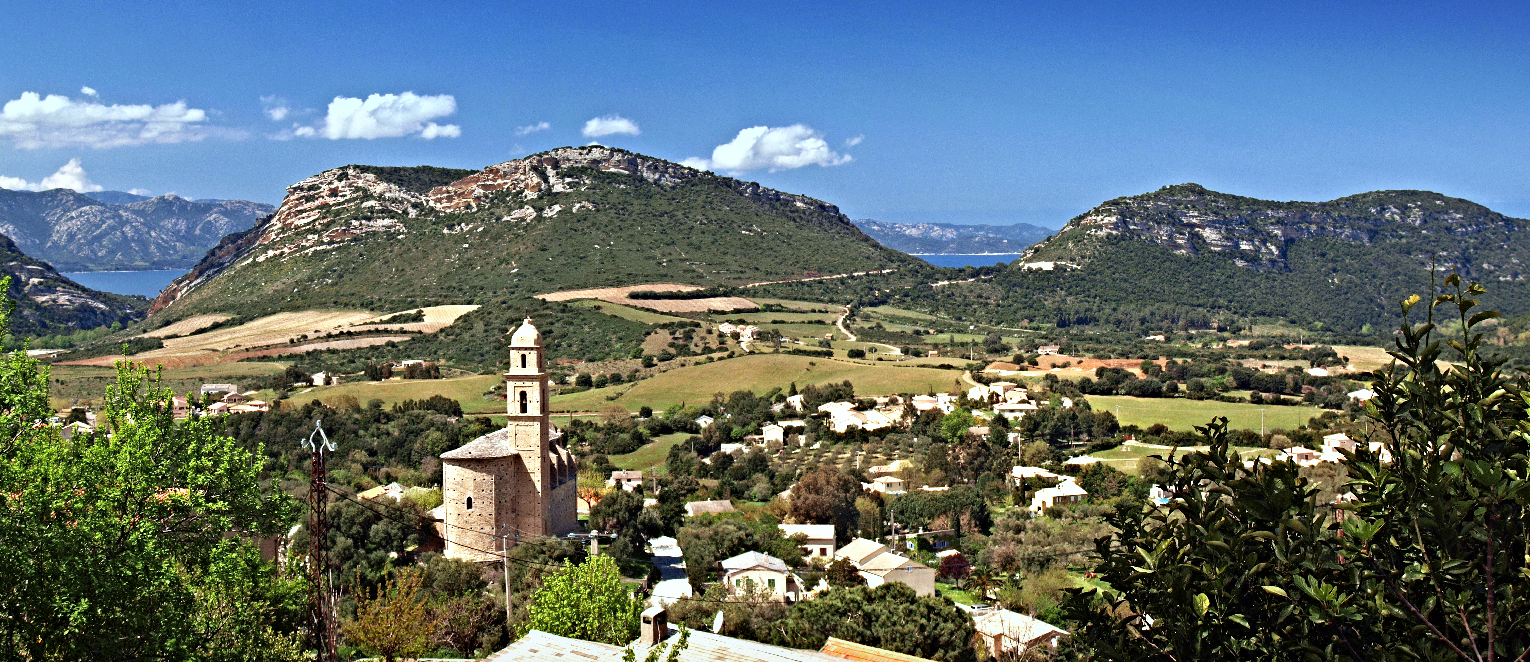 Patrimonio (Corsica) - Panorama de la plaine de Patrimonio